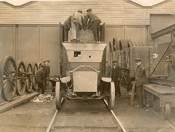 NLI Ref.: HOG101